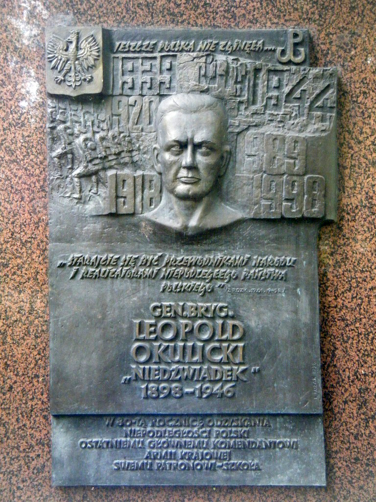 Tablica upamiętniająca gen. Leopolda Okulickiego. Warszawa, Saska Kępa, ul. Saska 78.